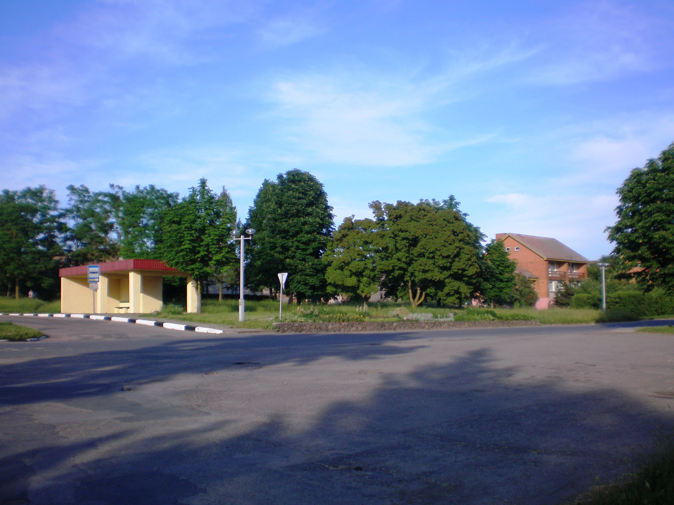 Localidad Labūnava en Municipio de Kėdainiai, Lituania